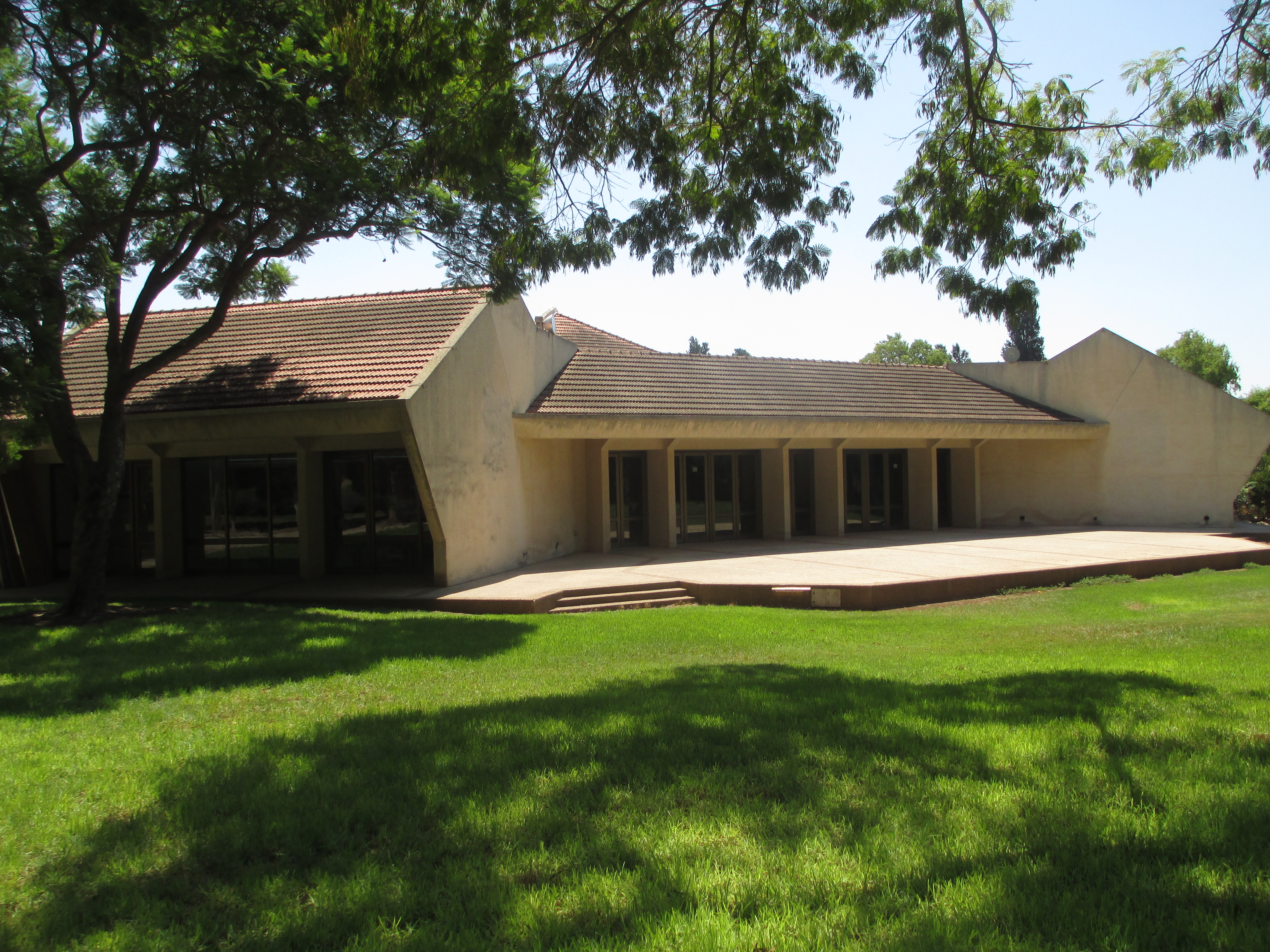 חדר האוכל במזרע